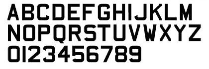 Font tipogràfica matrícules del Regne Unit